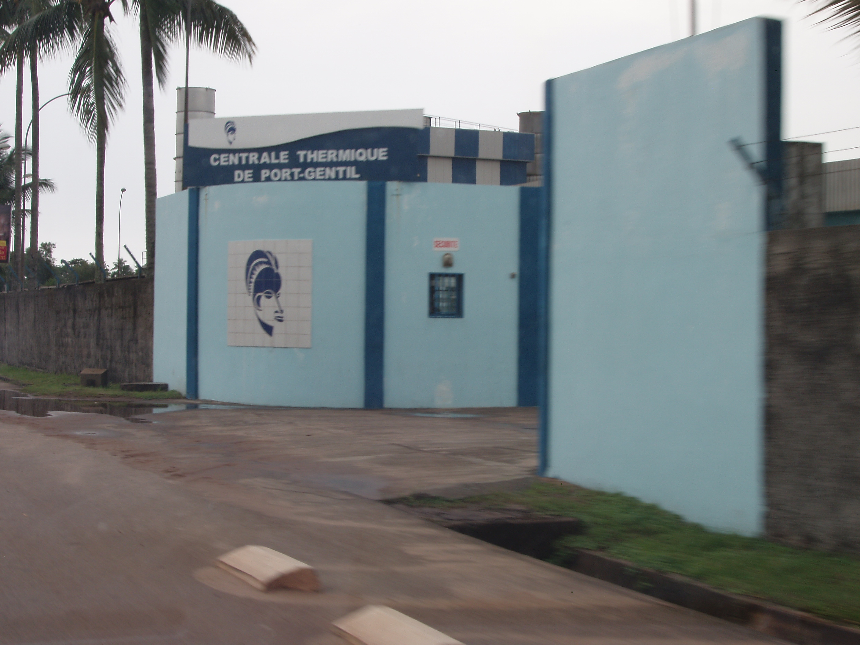 La nouvelle centrale thermique SEEG Veolia de Port-Gentil